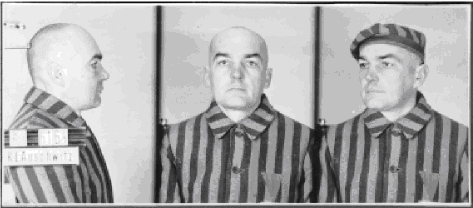 Made in KL Auschwitz